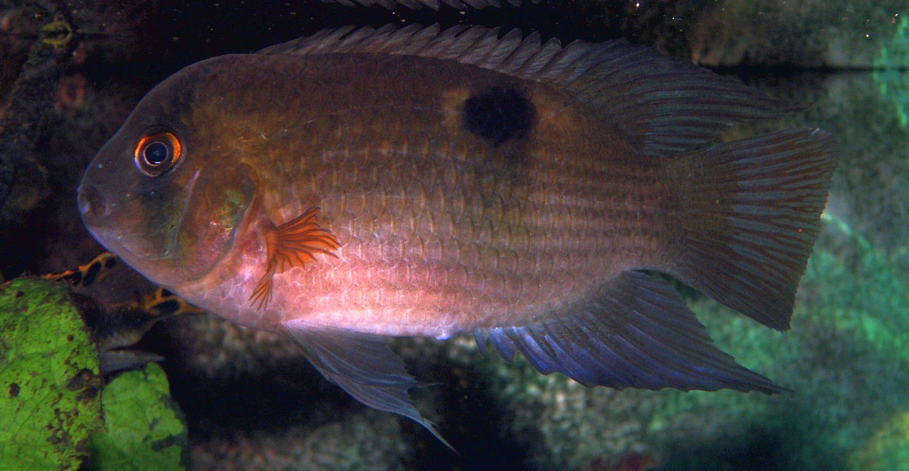 Cleithracara maronii, adultes Tier